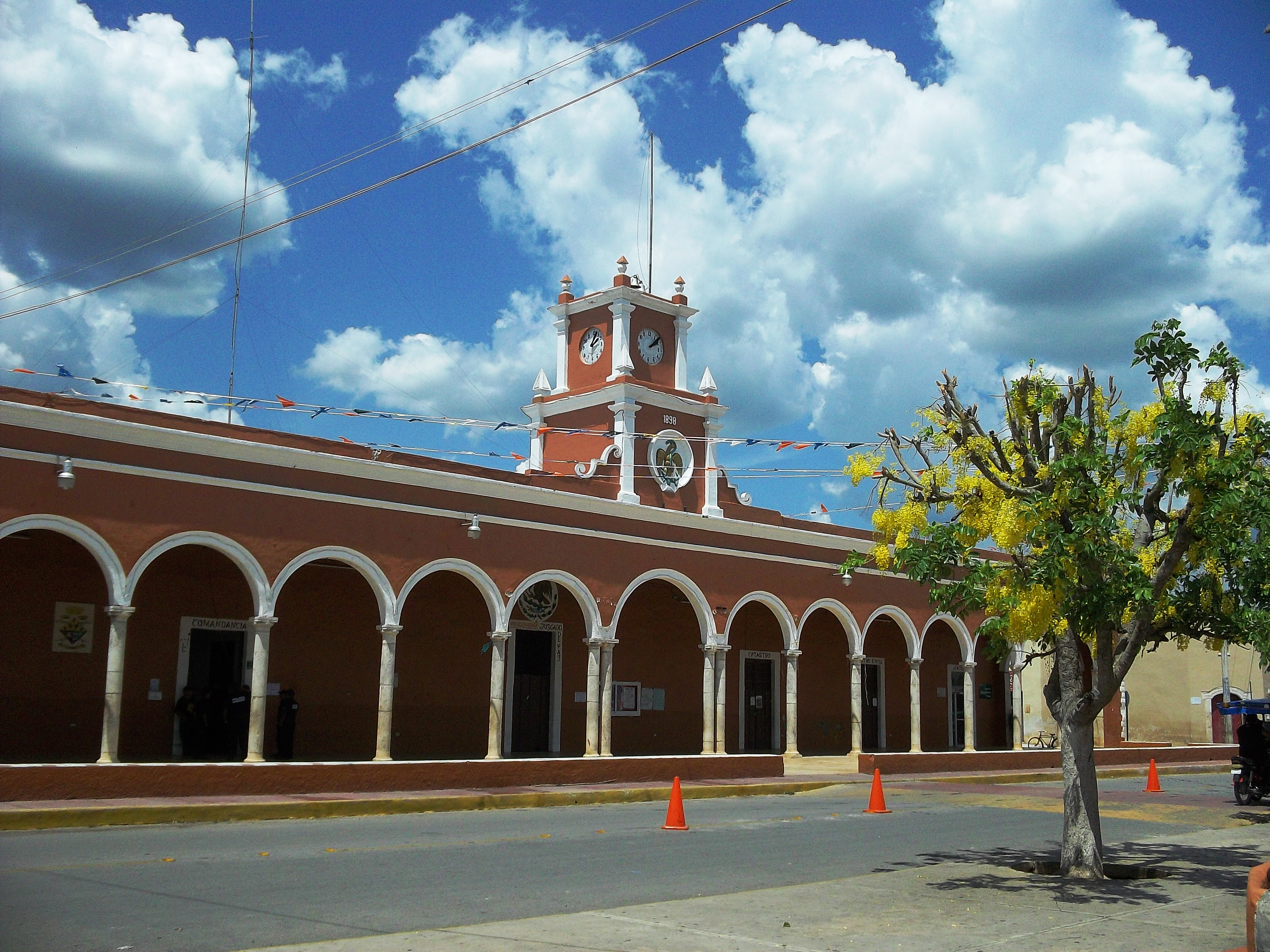 Palacio municpal de Temax. Yucatán.